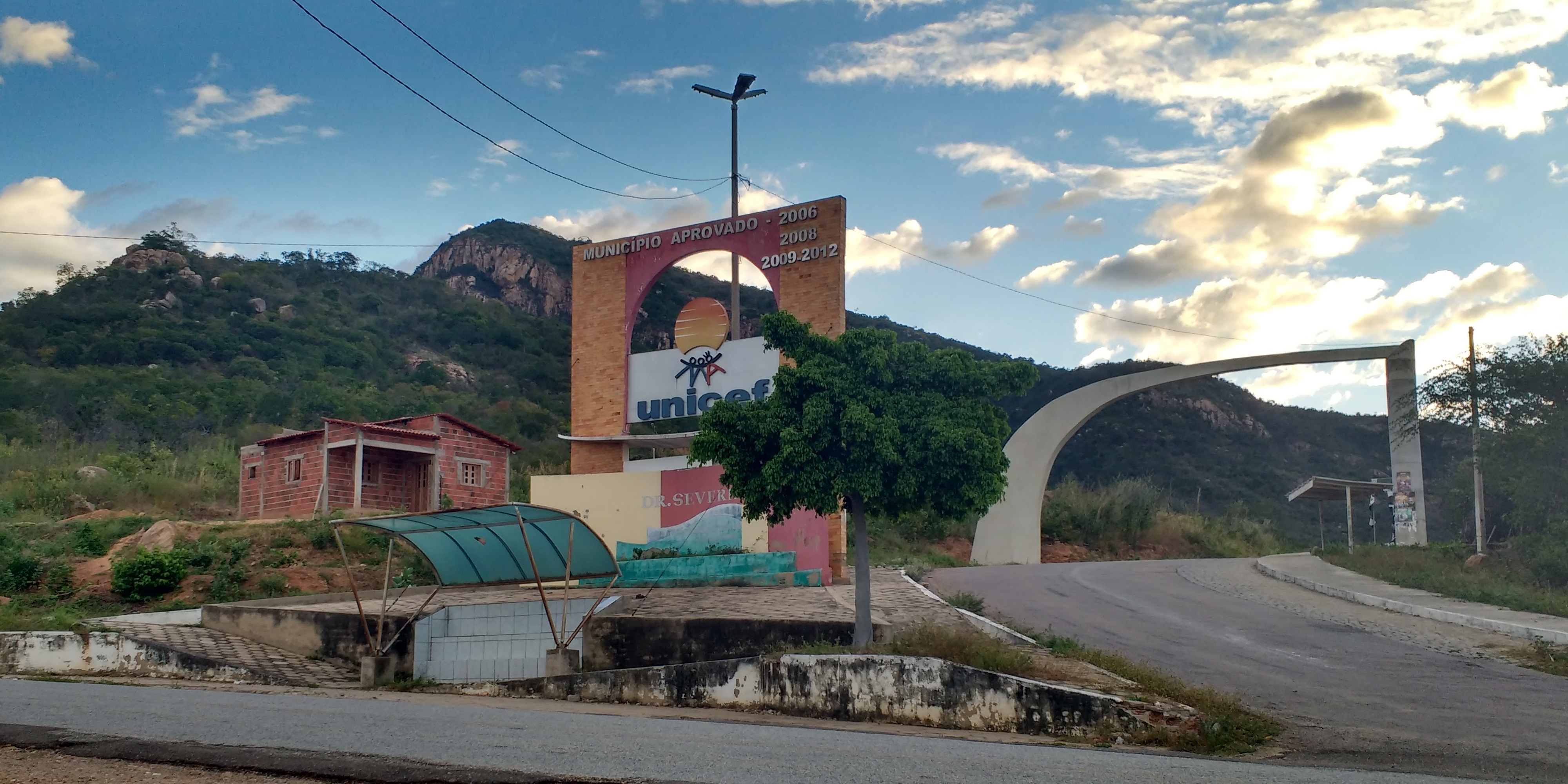 Pórtico de entrada para Doutor Severiano, Rio Grande do Norte (Brasil), no cruzamento da rodovia que dá acesso à cidade e com a estrada em direção à cidade de São Miguel.